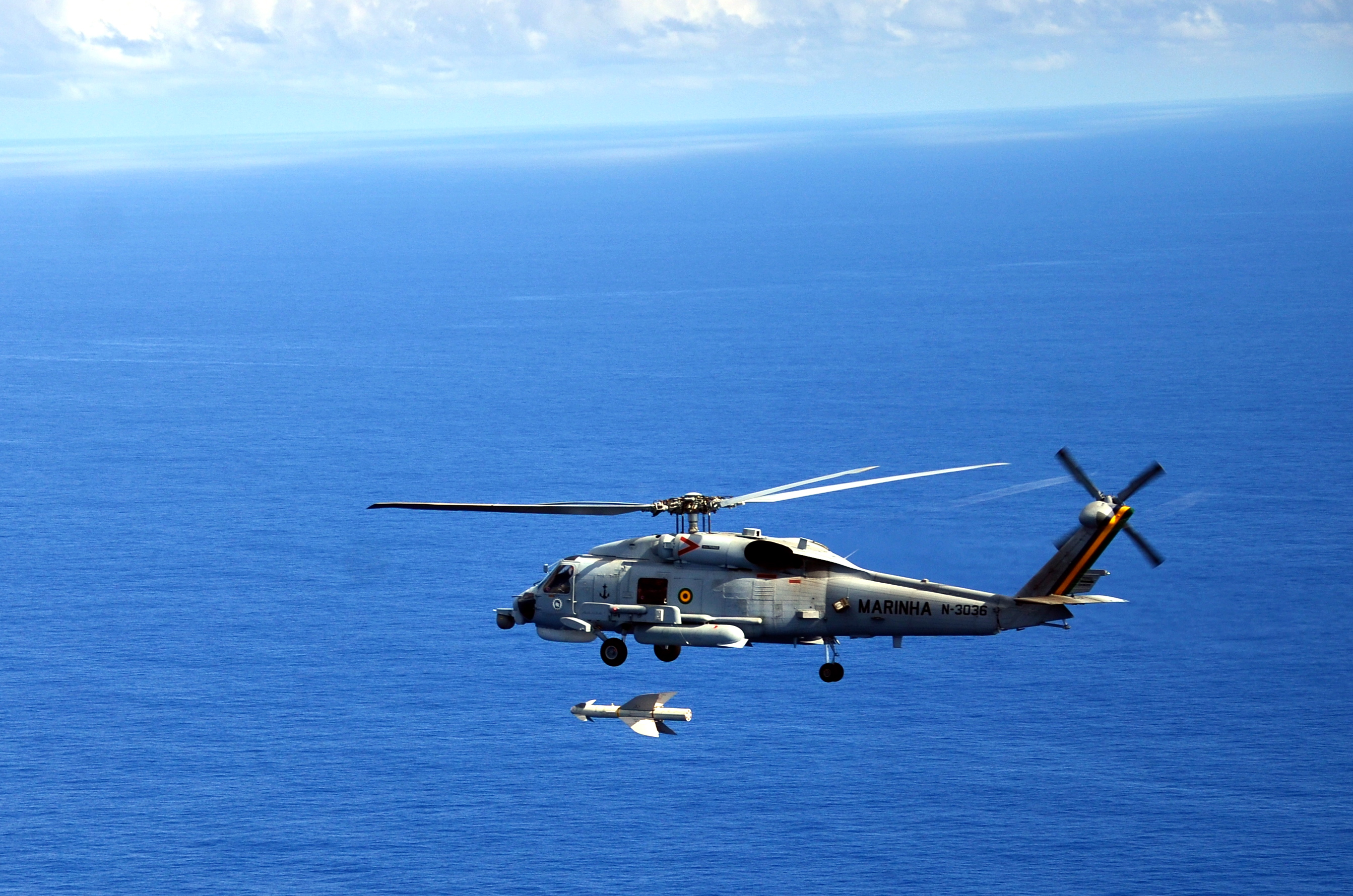 Arquivo liberado pela Marinha do Brasil através de projeto GLAM com Wiki Educação Brasil